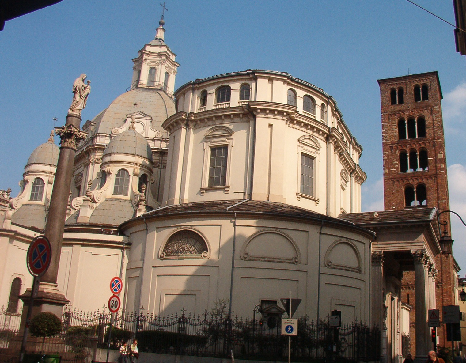 Santuario della Consolata a Torino - Italia